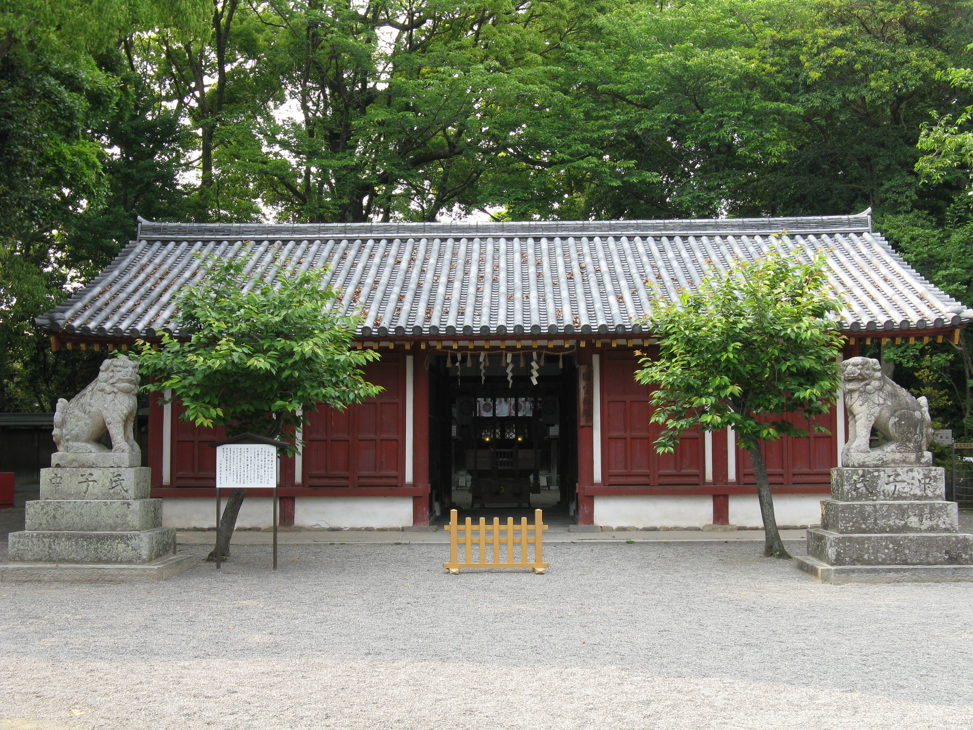 桜井神社 拝殿 Place:Osaka,Japan